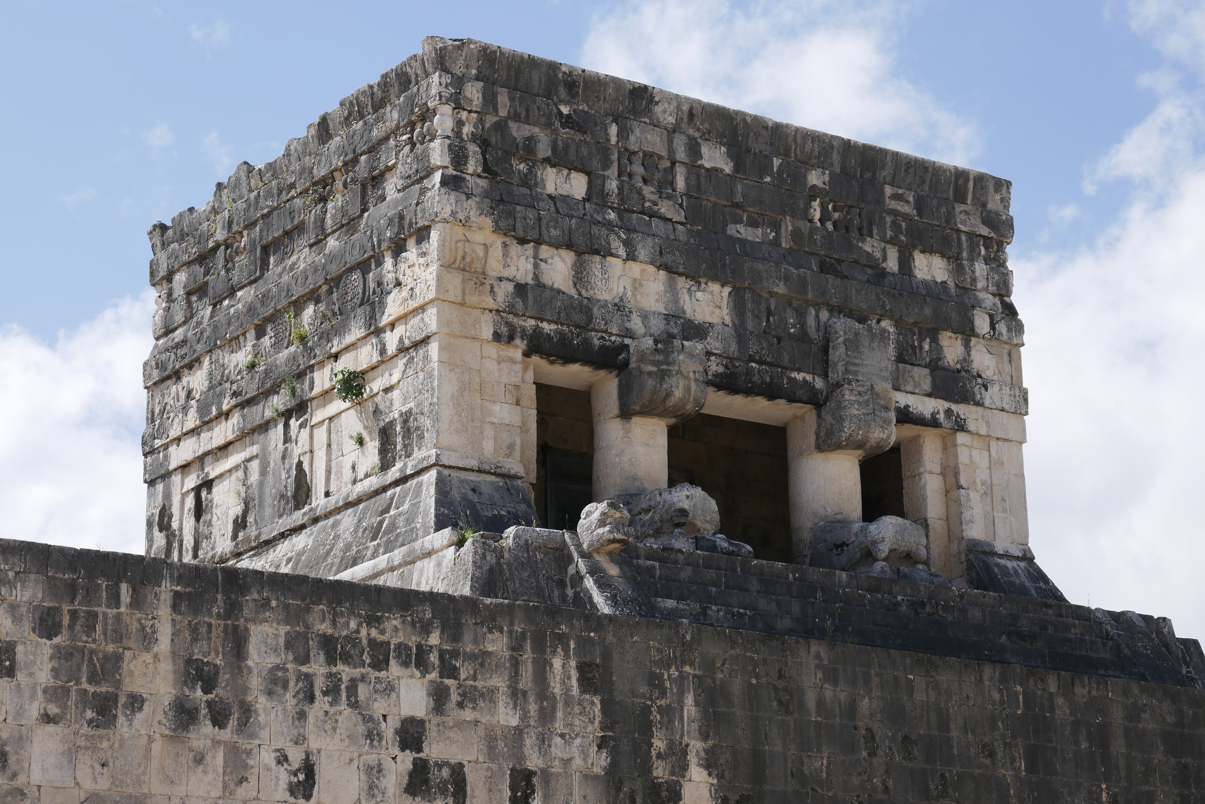 Ehrenloge am Spielfeld bei der Kukulcán Pyramide in Chichen Itza